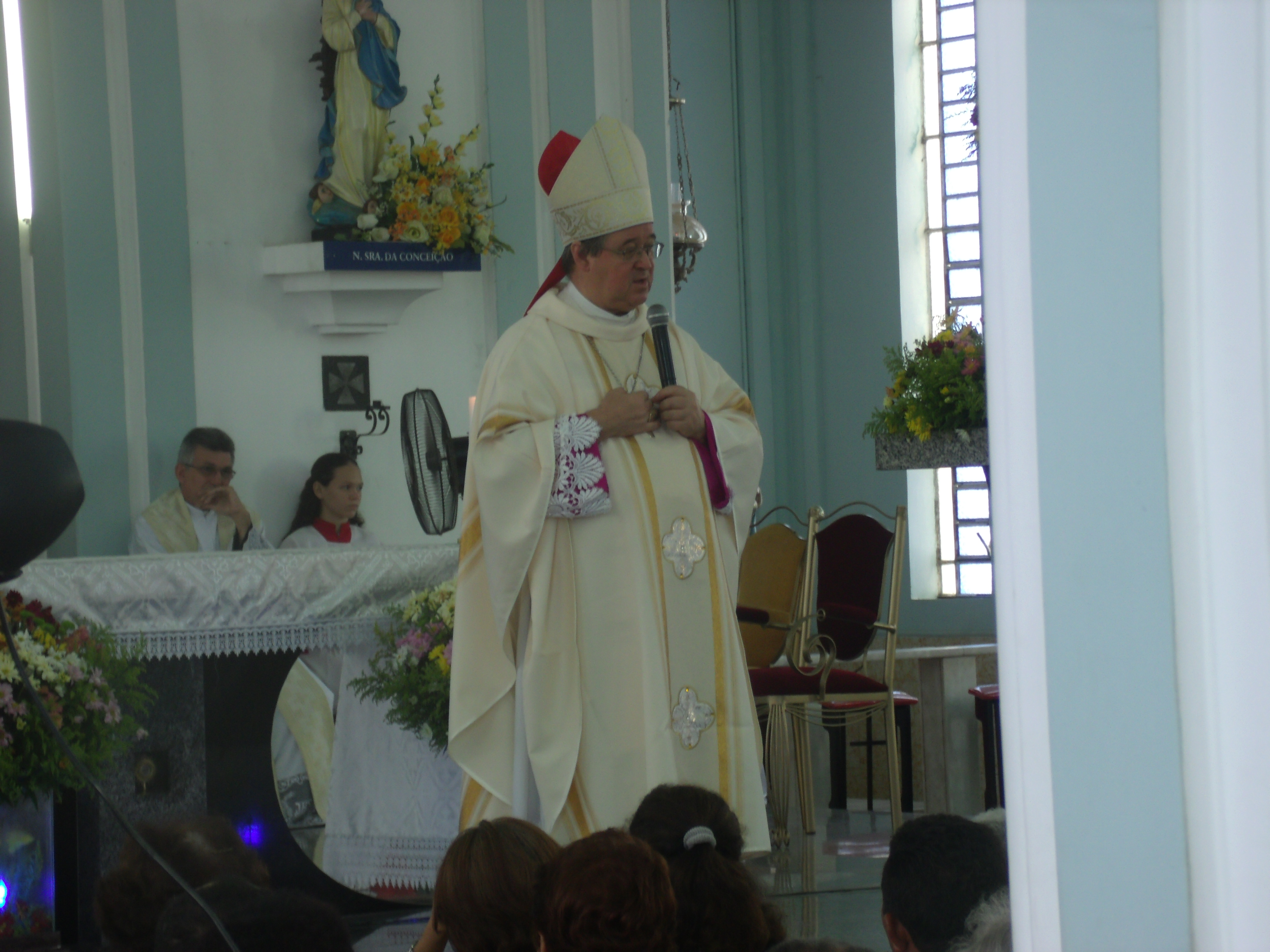 Dom Eduardo Zielski, segundo bispo da Diocese de Campo Maior, celebrando missa na Catedral de Santo Antonio.